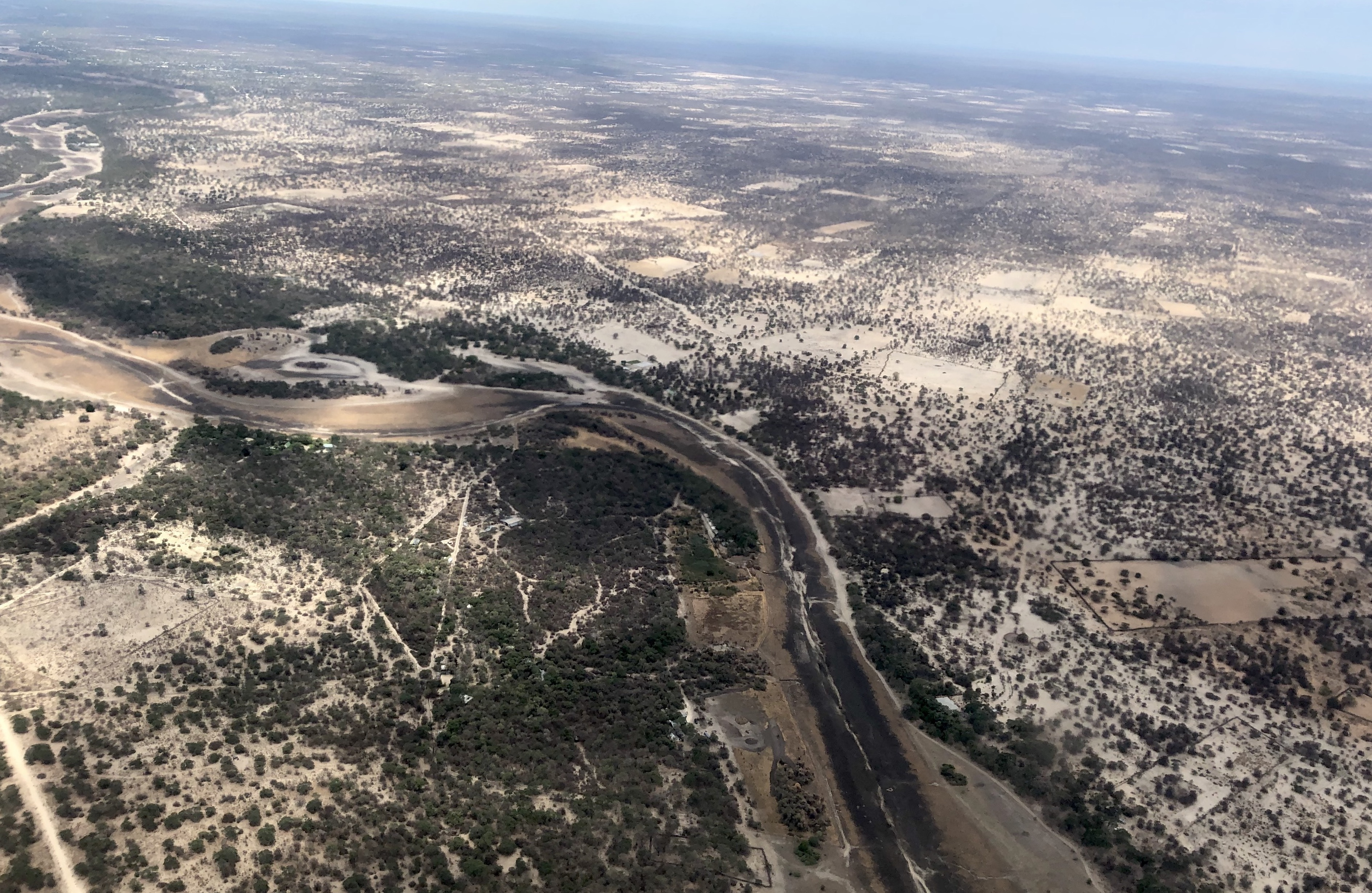 Thamalakane River südöstlich von Maun in Botswana